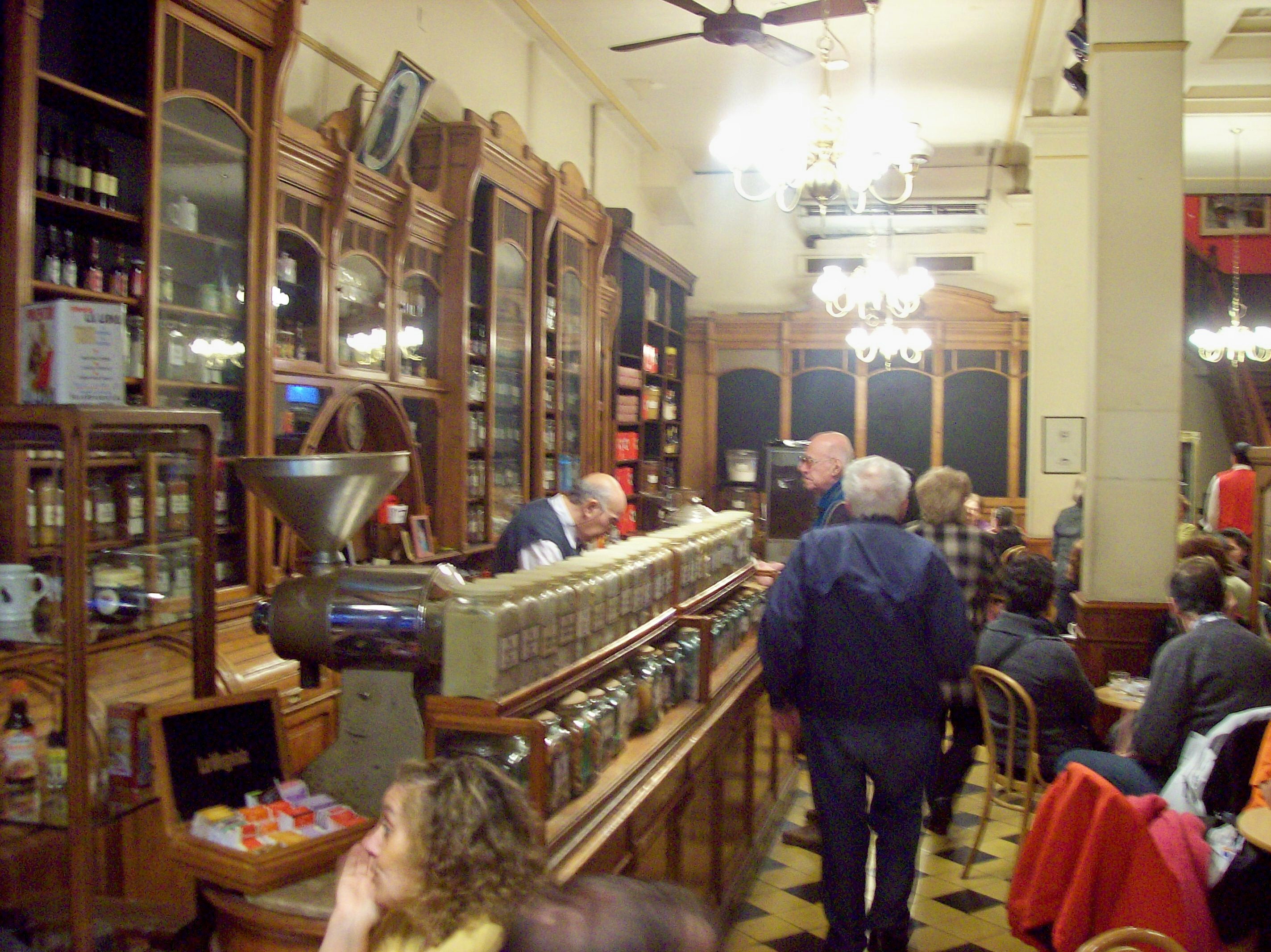 El gato negro (Corrientes 1669, barrio San Nicolás, Buenos Aires, Argentina) es un bar donde se puede disfrutar de gran variedad de estilos de infusiones. Es una de las especierías más antiguas de la ciudad de Buenos Aires (creada en 1927). Tiene un amplio salón en el primer piso. También hay shows de tango, jazz y música melódica.